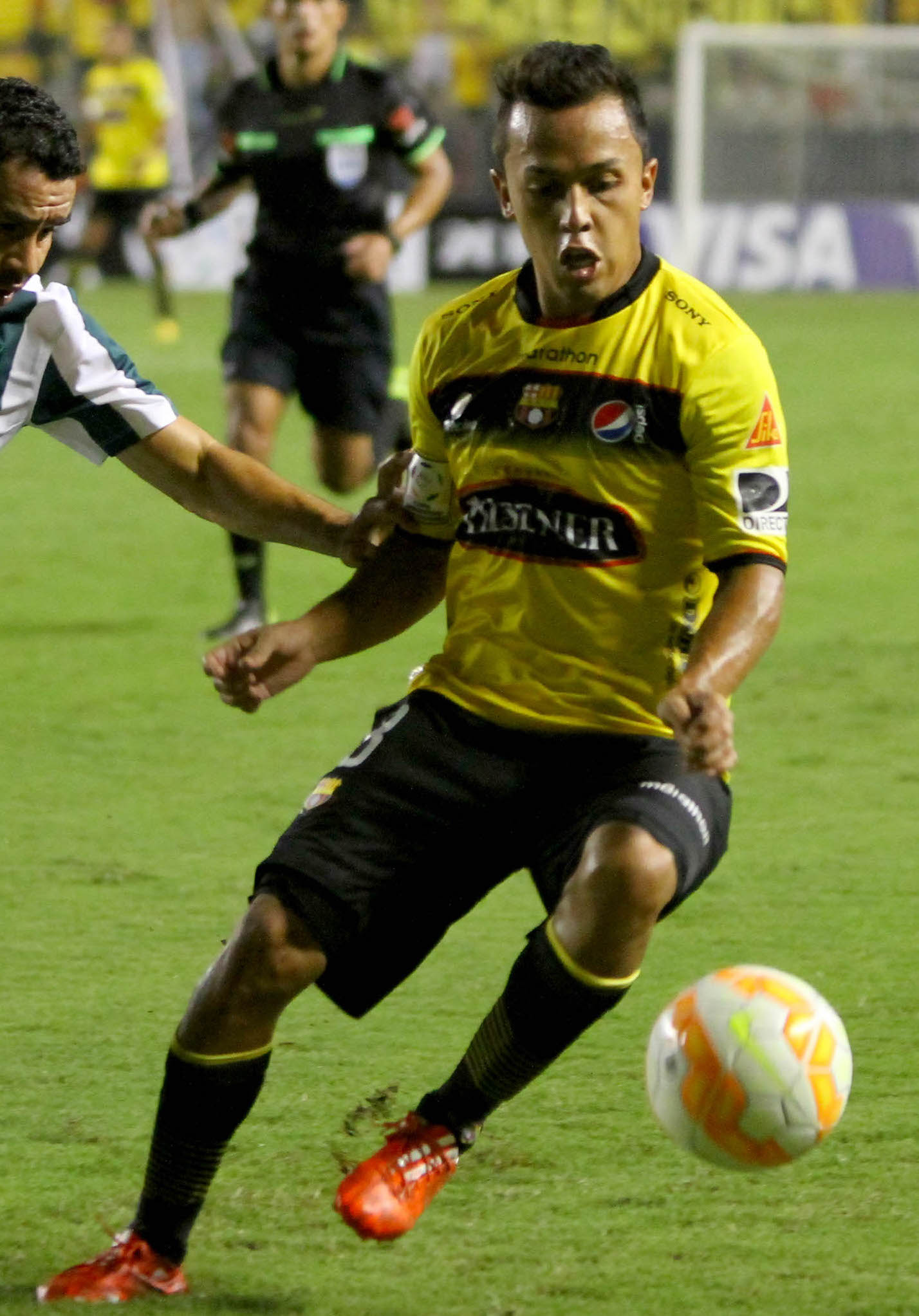 Edison Vega en Copa Libertadores 2015